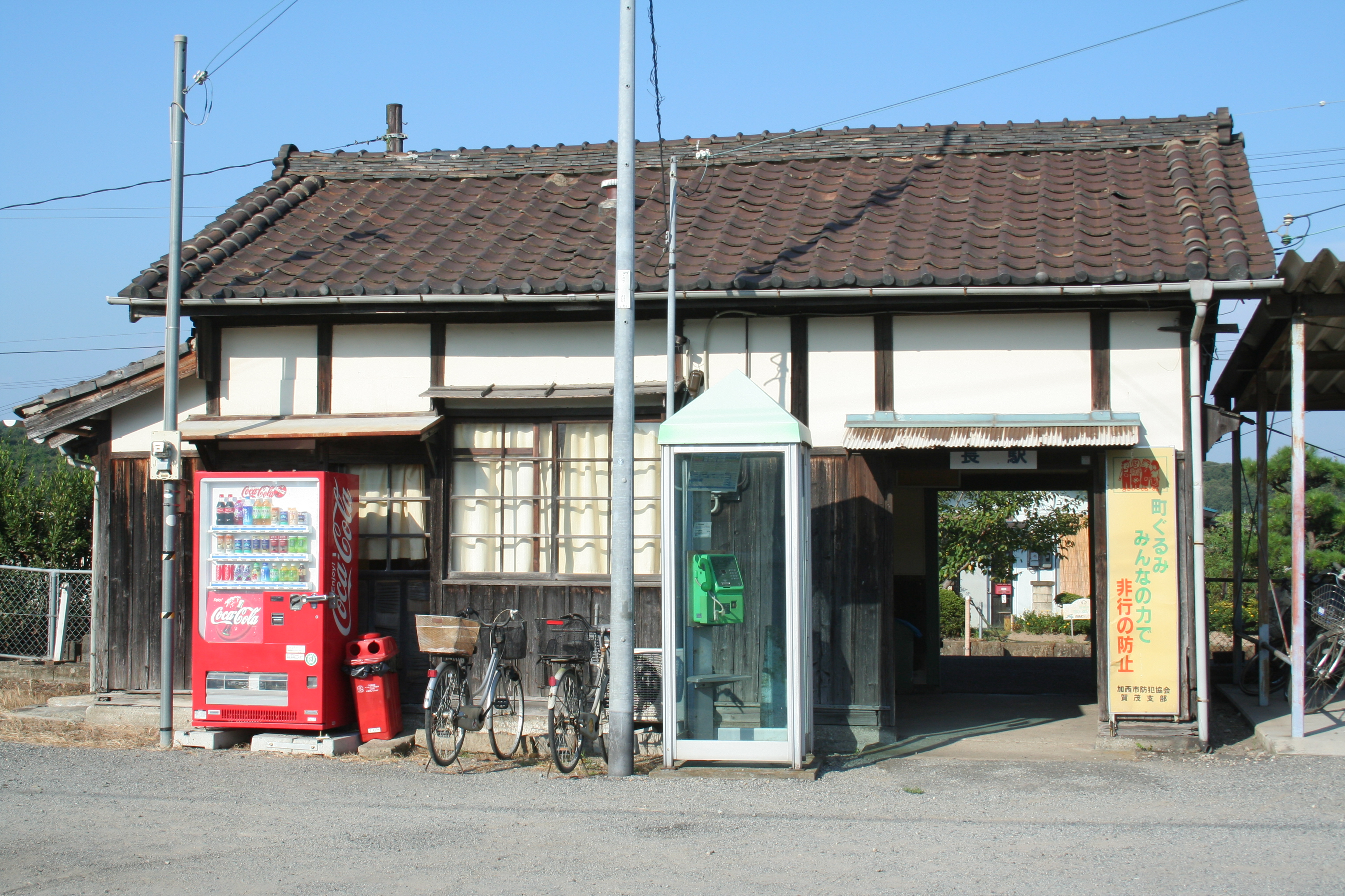 長駅。日本にある鉄道駅の一つ。